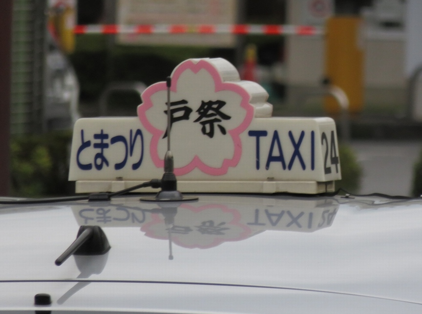 戸祭タクシーの行灯（社名表示灯） 2017年7月18日 JR宇都宮駅前で同社タクシー車両を後方より撮影。